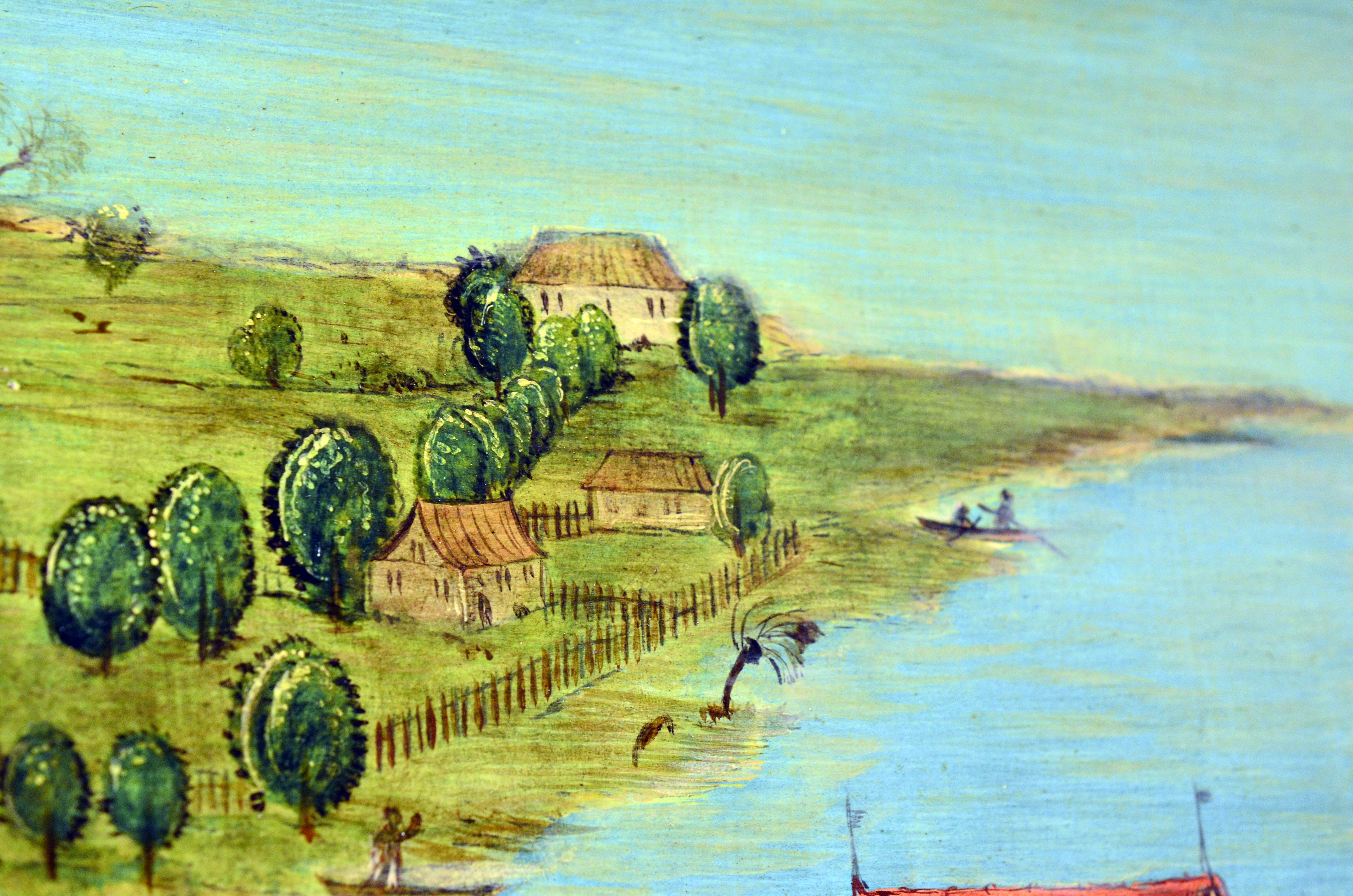 Das Zürichhorn auf der Replik der Altartafeln von Hans Leu im Baugeschichtlichen Archiv der Stadt Zürich im Haus zum Rech. Die Panoramansicht des linksseitigen Limmatufers – 'Standort' der BetrachterIn ist wohl der Karlsturm des Grossmünsters – von Hans Leu d. Ä. gilt als die älteste zuverlässige Darstellung der Stadt Zürich, Ende des 15. Jahrhunderts auf den Altartafeln im Grossmünster mit viel Liebe zum Detail festgehalten. Die originalen Tafeln sind heute im Landesmuseum ausgestellt, eine (vermutlich) 1:1 Replik ist im Stadtarchiv öffentlich zugänglich.